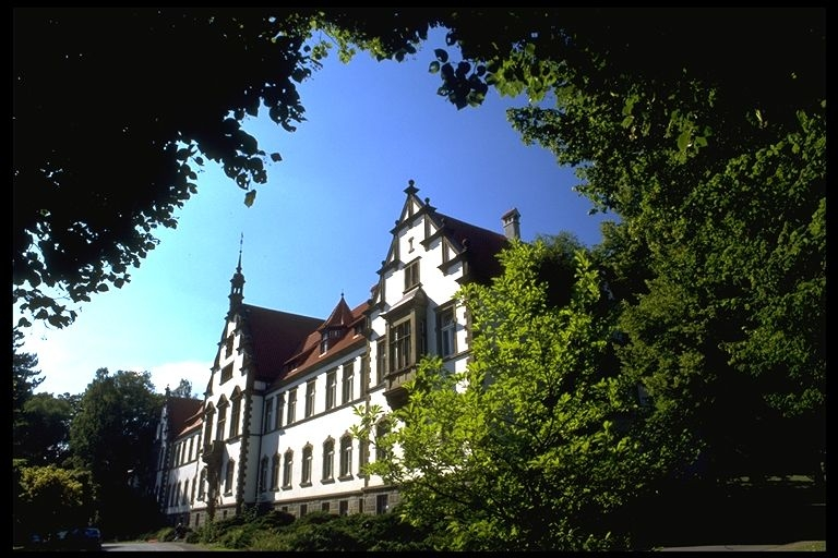 Verwaltungsgebäuder der LWL-Klinik Warstein, Haus 1